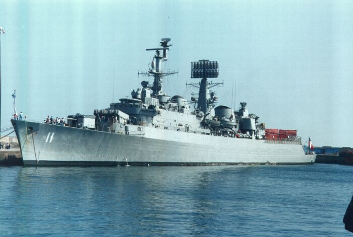 Destructor Cap Prat DLH-11